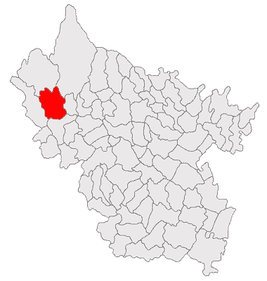 Categorie:Hărţi ale judeţului Buzău